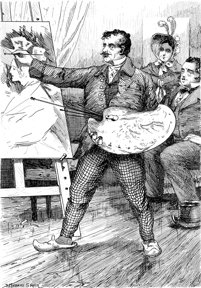 Illustration of Honoré de Balzac's Pierre Grassou (1839).